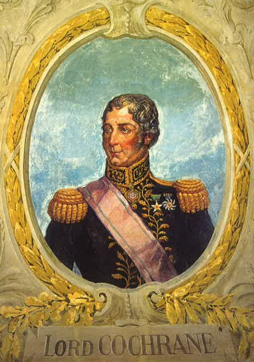 Oscar Pereira da Silva - Lord Cochrane (Thomas Alexander Cochrane, Conde de Dundonald), c. 1925. Óleo sobre tela (marouflage), 195 x 135 cm. Museu Paulista/USP - São Paulo, SP, Brasil.